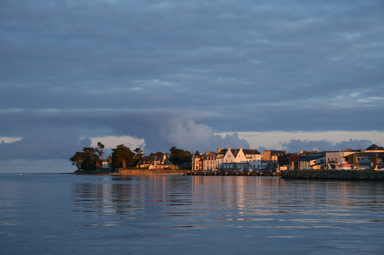 Loctudy